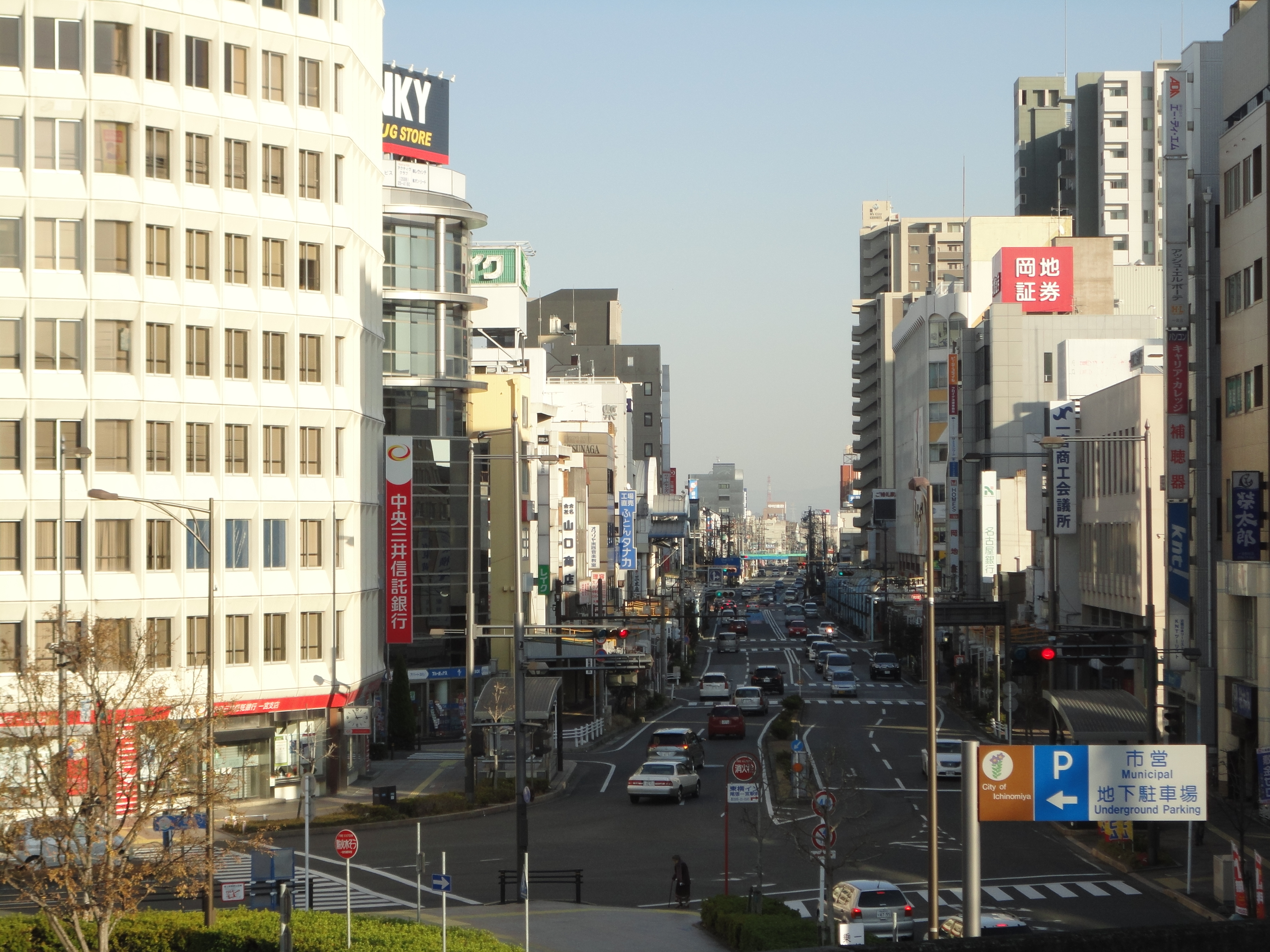 尾張一宮駅